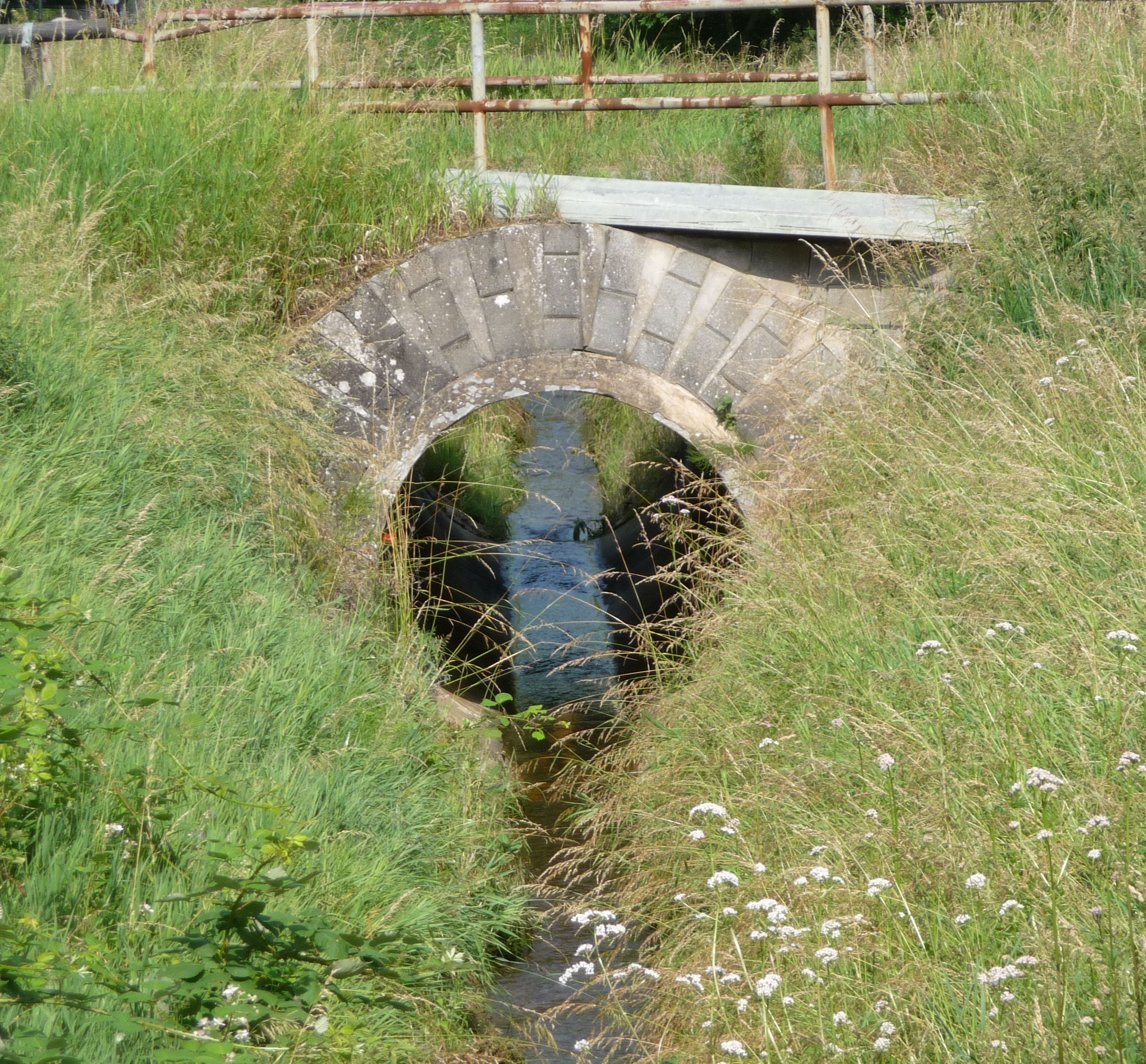 Seufzerbrücke bei Walsheim